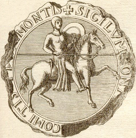 Scan d'un Sceau provenant des "Mémoires pour servir de preuves à l’histoire ecclésiastique et civile de Bretagne, tirés des archives de cette province, des celles de France & d’Angleterre, des Recueils de plusieurs savants Antiquaires, & mis en ordre, par Dom Hyacinthe Morice, Prêtre, Religieux Bénédictin de la Congrégation de S. Maur"